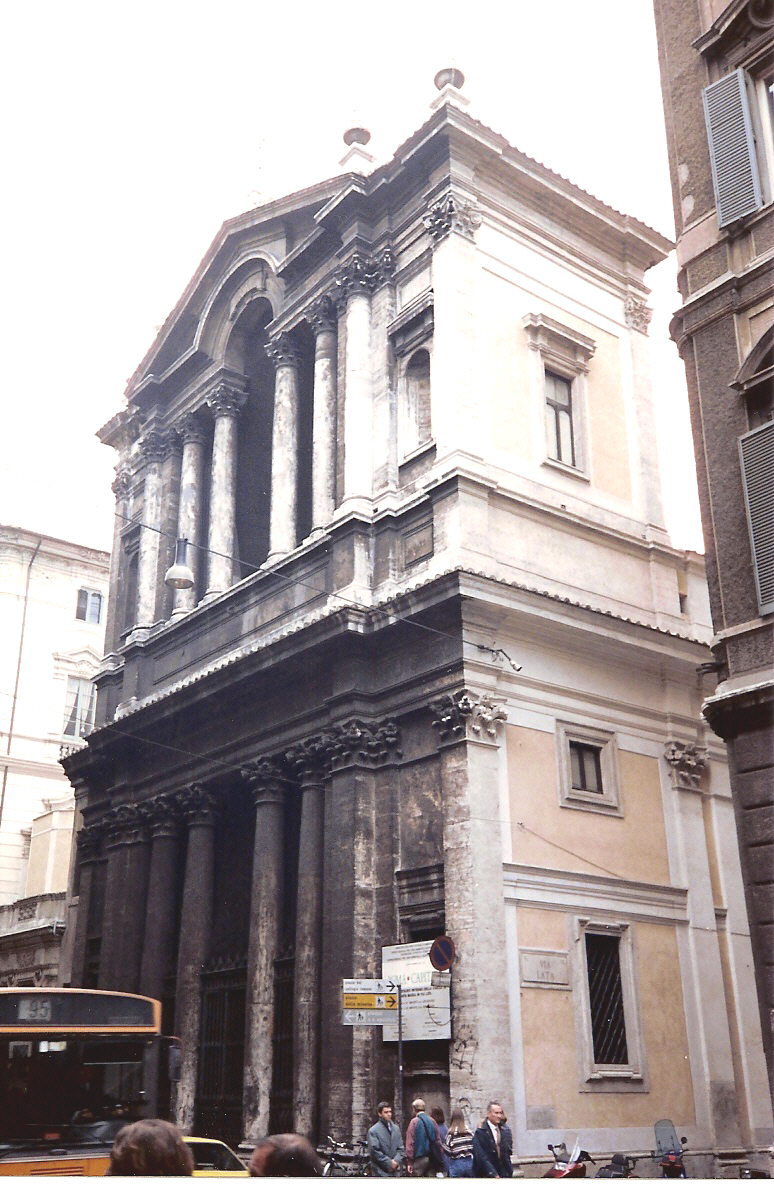 Chiesa di Santa Maria in Via Lata, Roma. Facciata di Pietro da Cortona. Picture by Torvindus.